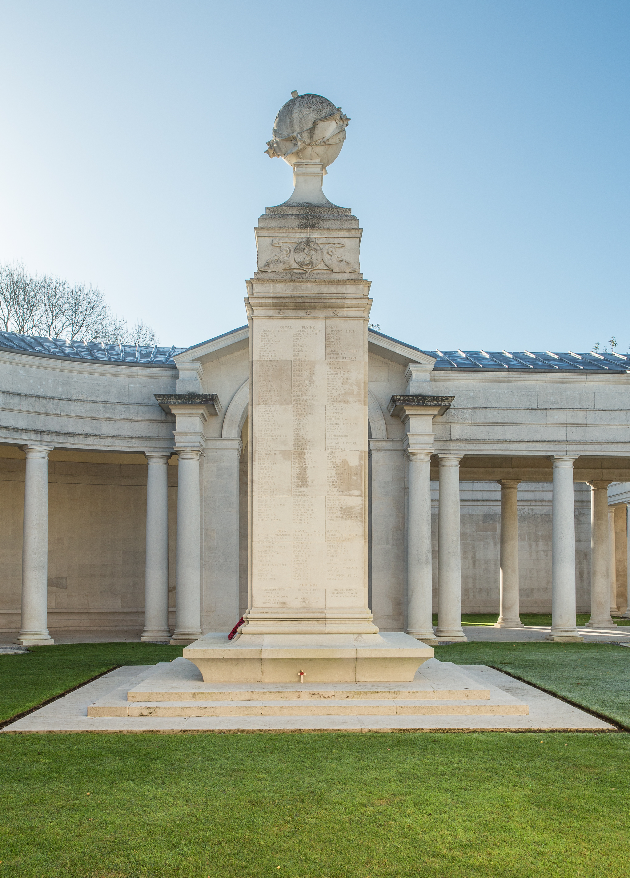 Arras Flying Services Memorial